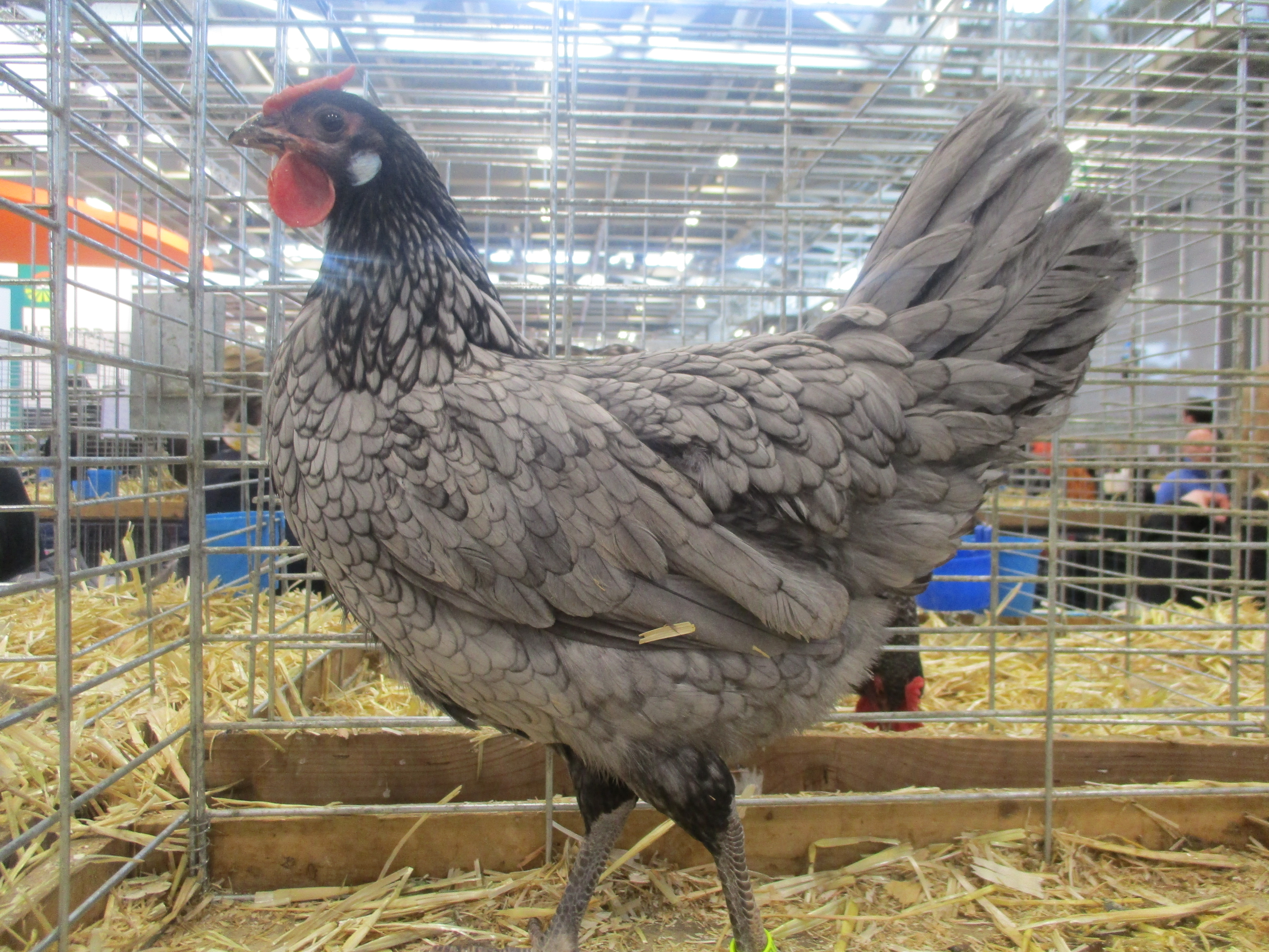 Poule d'Alsace coloris bleu liséré noir.